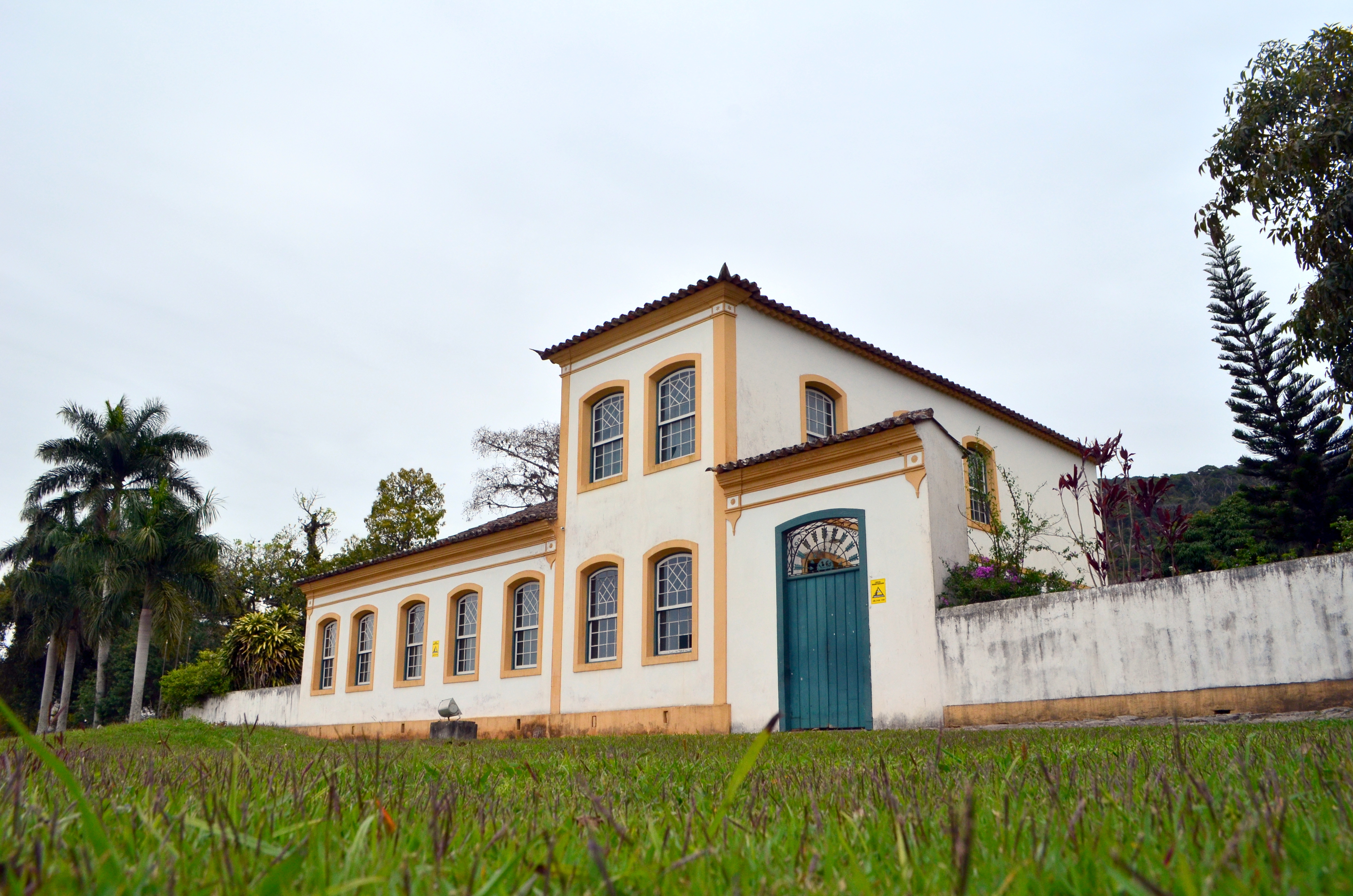 Sobrado (Museu Etnográfico)